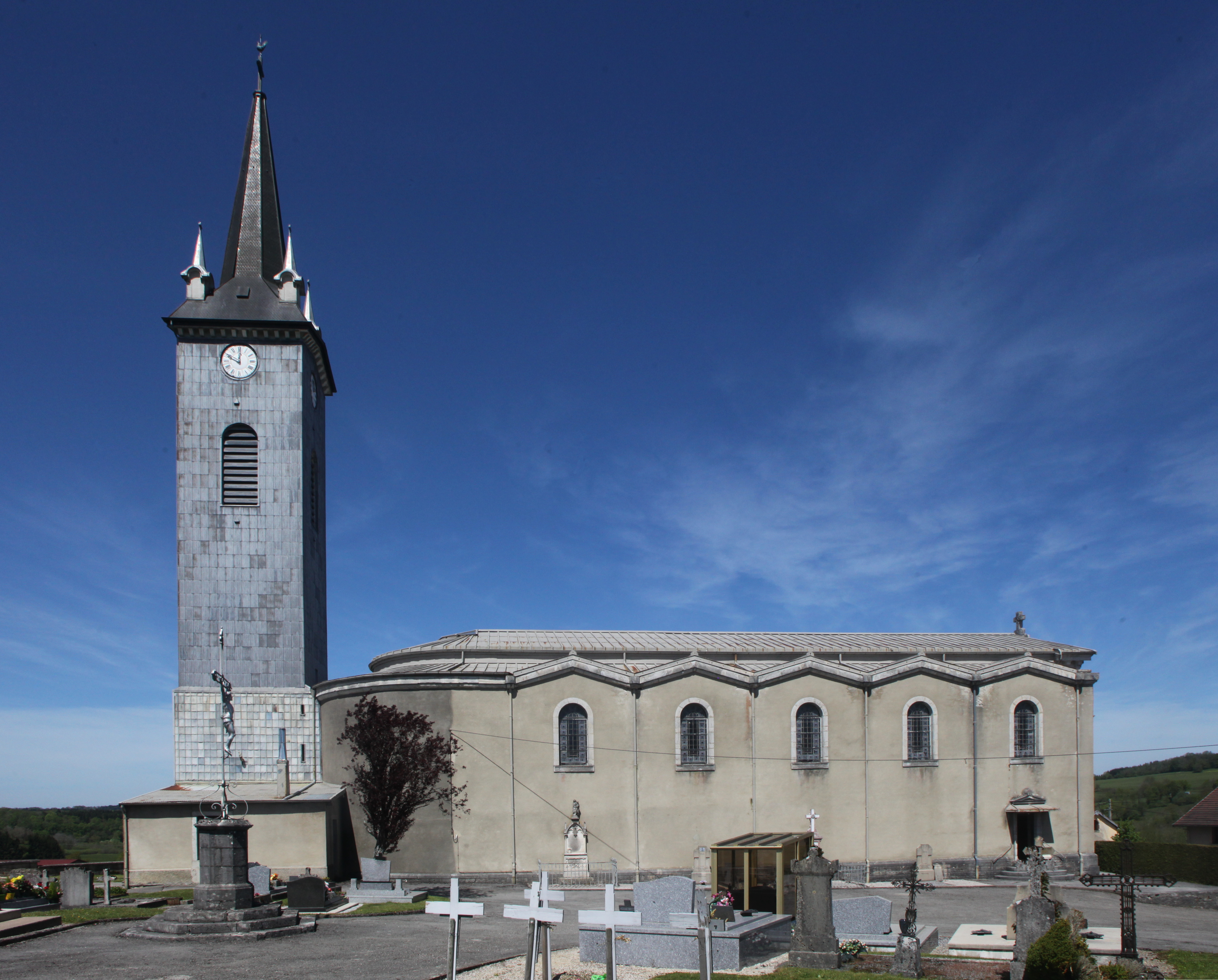 Église d'Arc-sous-Montenot (Doubs).